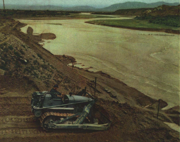 1952 建造中的永定河官厅水库